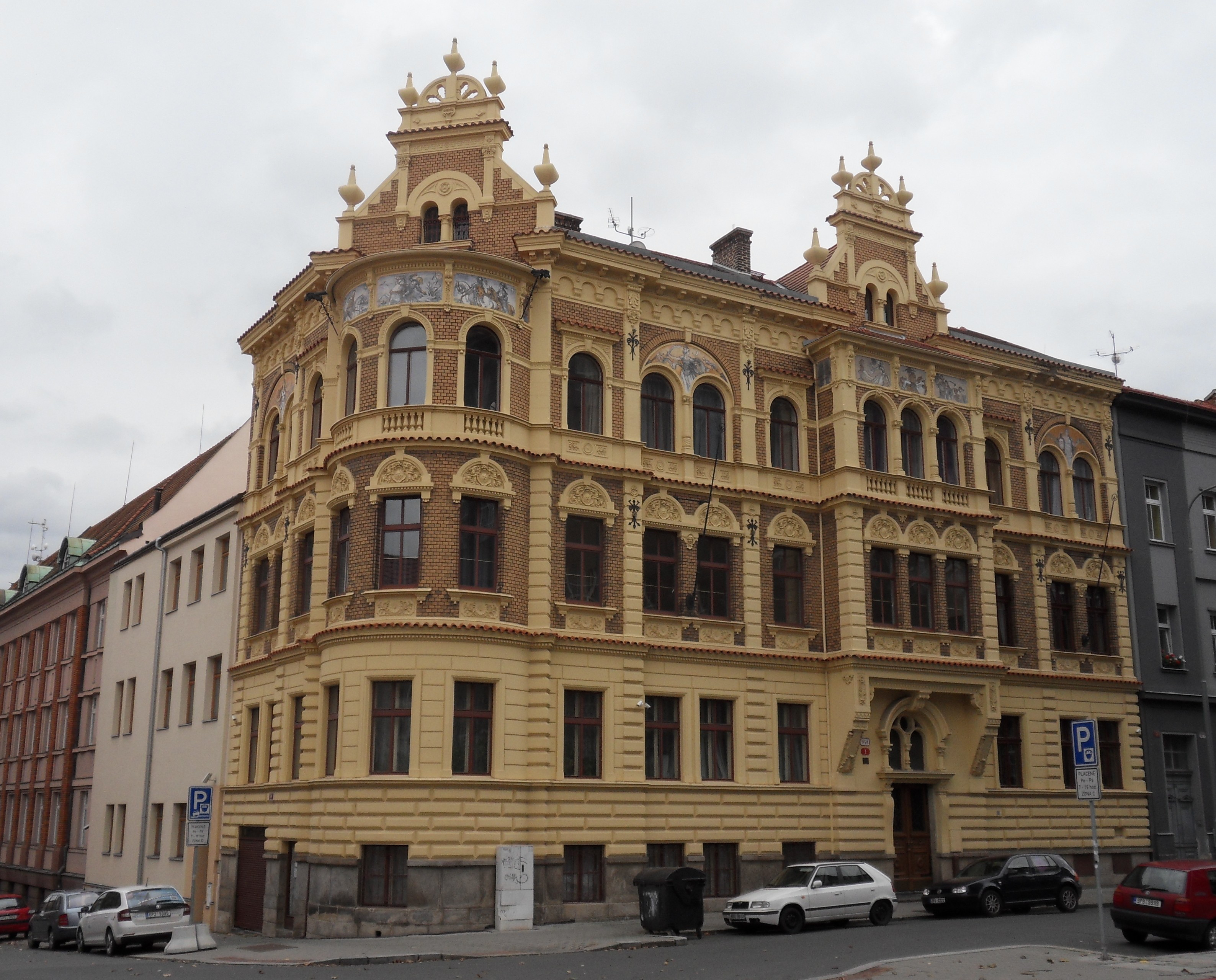 Jagellonská 15, Plzeň 3-Jižní Předměstí, Jagellonská 948/15, Petákova 948/1, Plzeň.